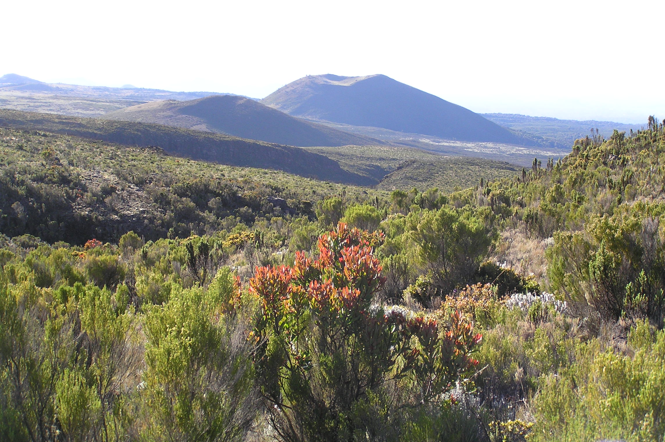 Kilimanjaro climb